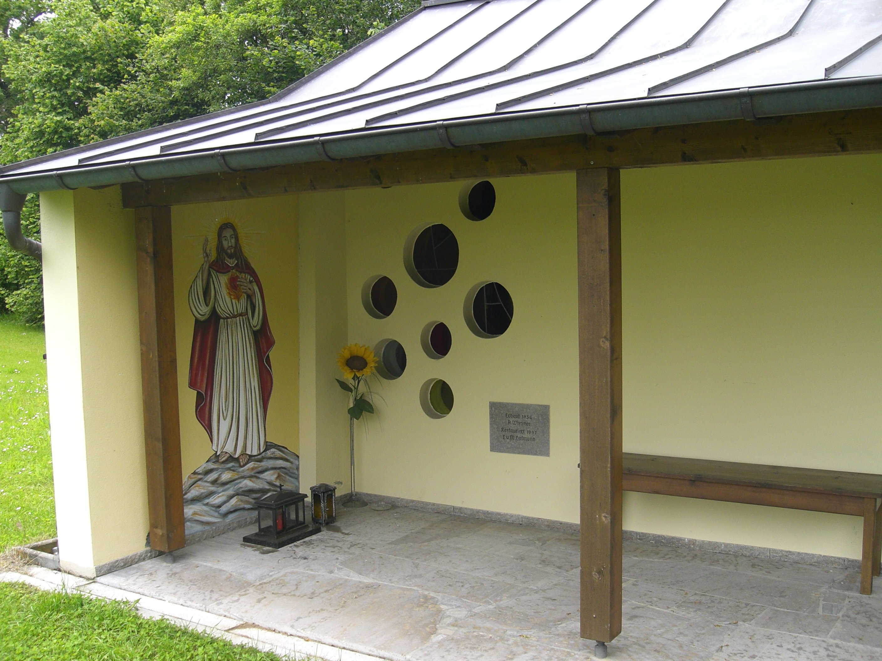 Kapelle in Greßthal von außen.